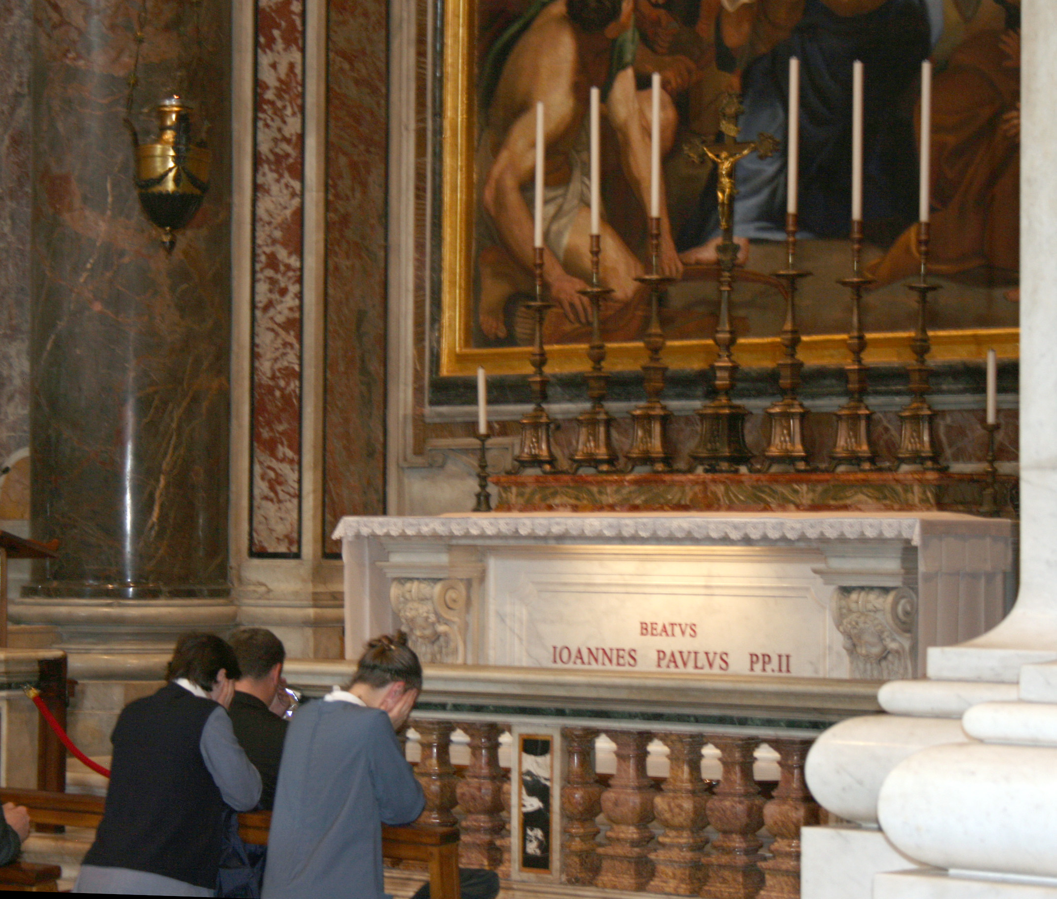 Grób Bł. Jana Pawła II w kaplicy Św. Sebastiana